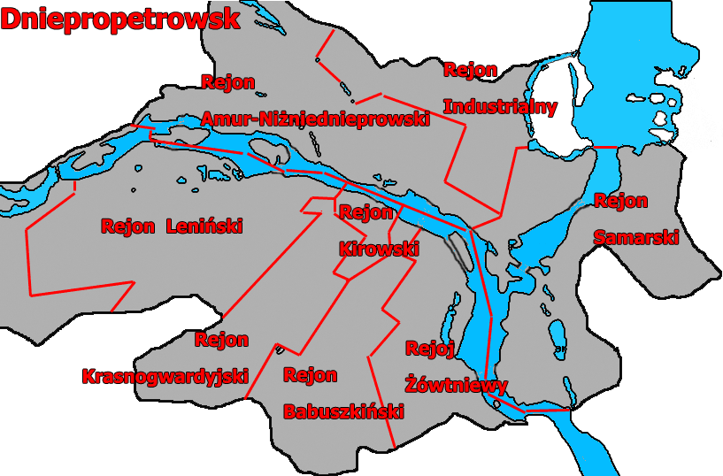 Schemat podzialu na dzielnice miasta Dniepropetrowsk